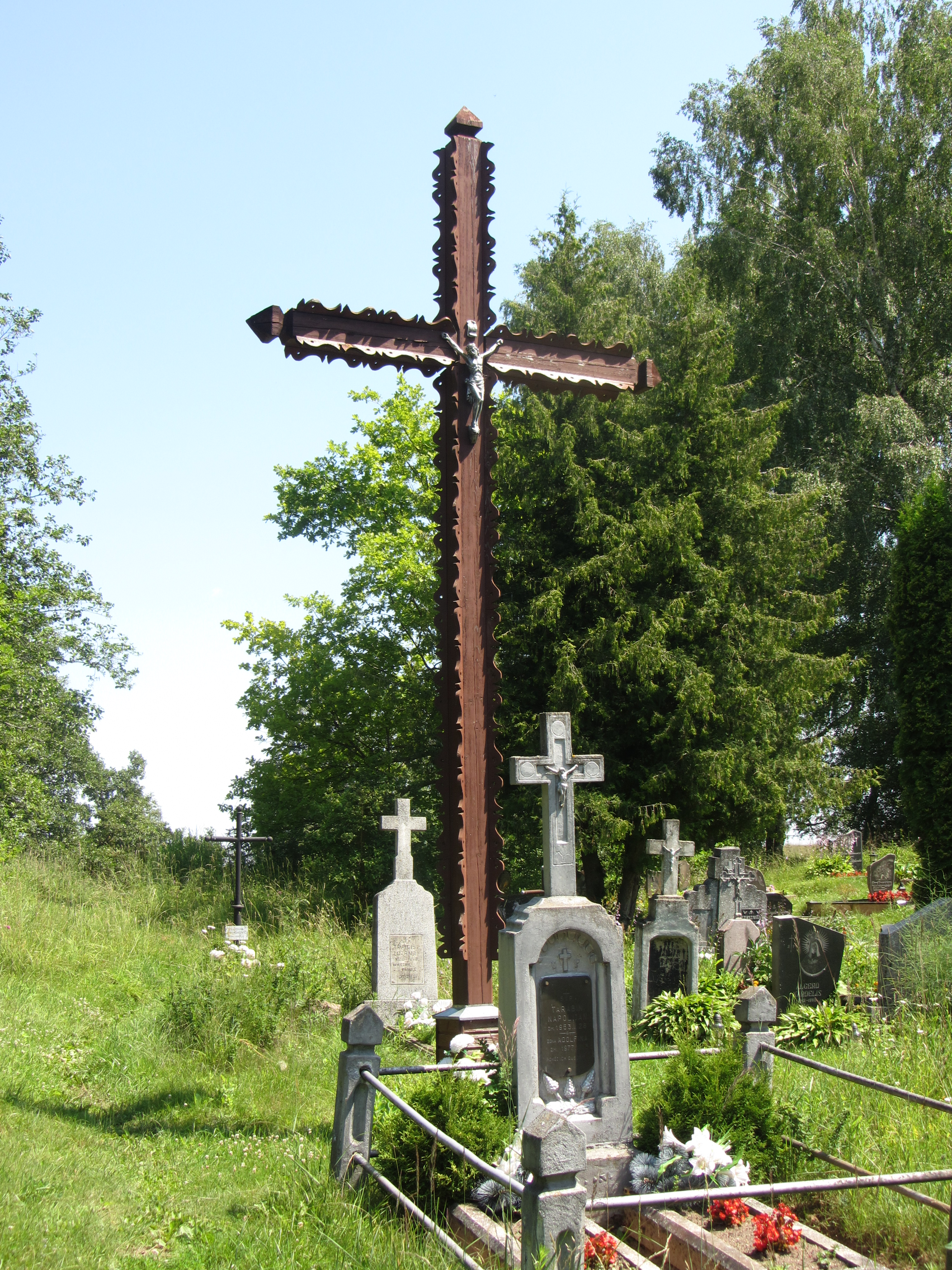 Rimšės sen., Lithuania